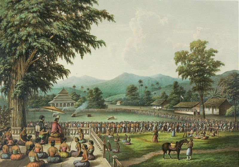 Litho. Litho naar een tekening van L.H.W.M. de Stuers. Pagina 12 van de map "De Indische Archipel", Den Haag, 1865-1876, met daarin 24 kleurenlitho's, van objectnr. 3728-430 t/m 3728-479.. Een tijgergevecht